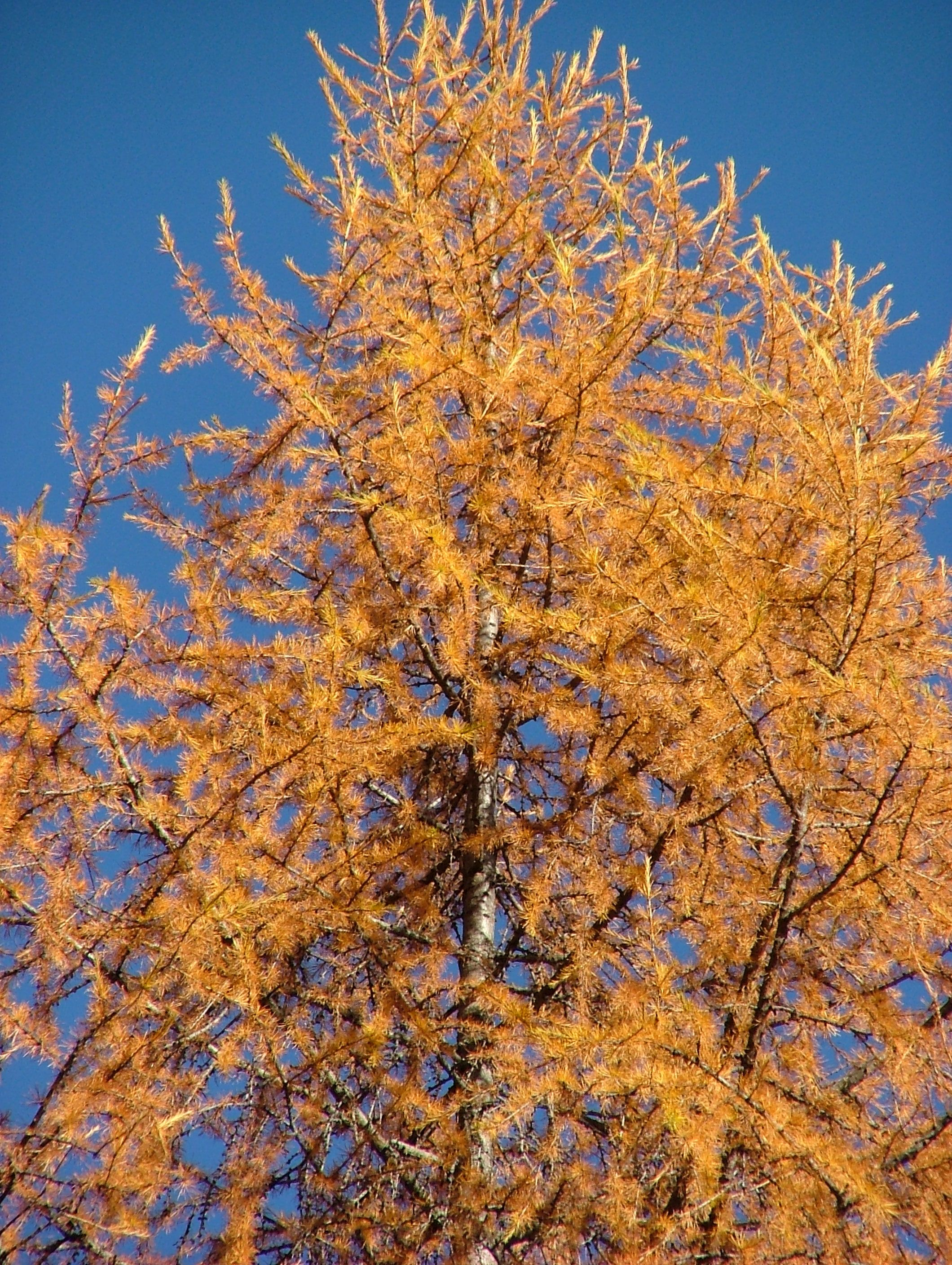 Un Larice (Larix decidua) delle Dolomiti in autunno